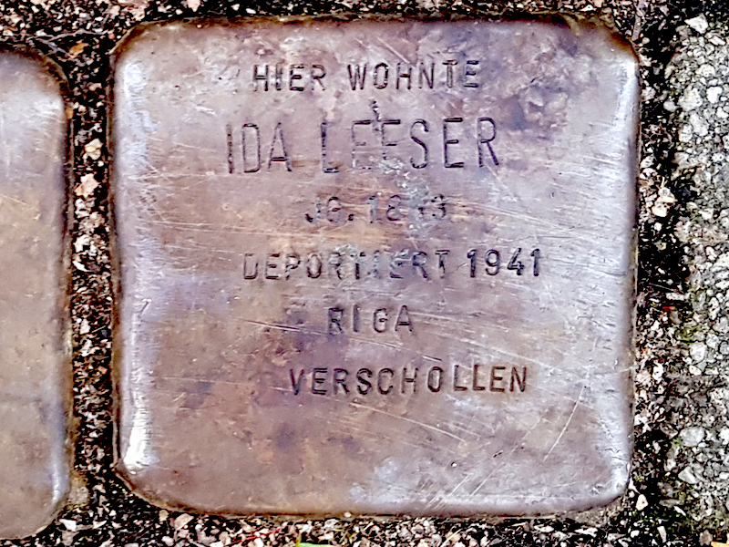 Stolperstein für Ida Leeser, Schweizerstr. 15, Duisburg-Duissern